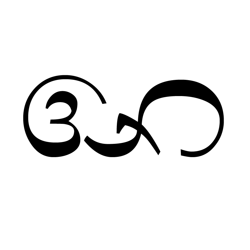 Long A Kara